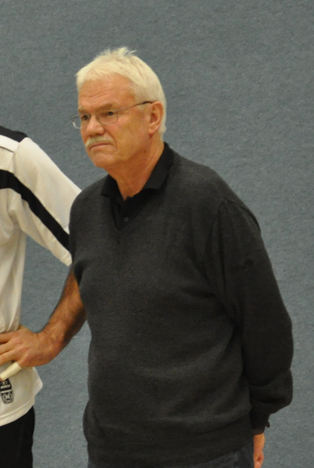 Der deutsche Handballtrainer Kurt Reusch am 10. Dezember 2010 in der "Sporthalle am Mühlenberg" in Ribnitz-Damgarten bei einem Spiel zu Ehren des 70. Geburtstages des Physiotherapeuten Klaus Bergmeier.